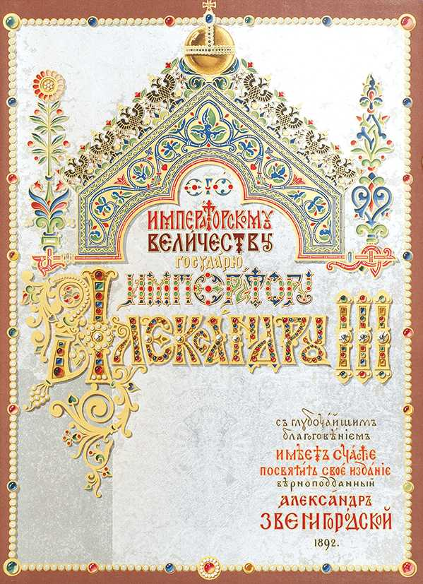 Авантитул книги "Византийские эмали Звенигородского"